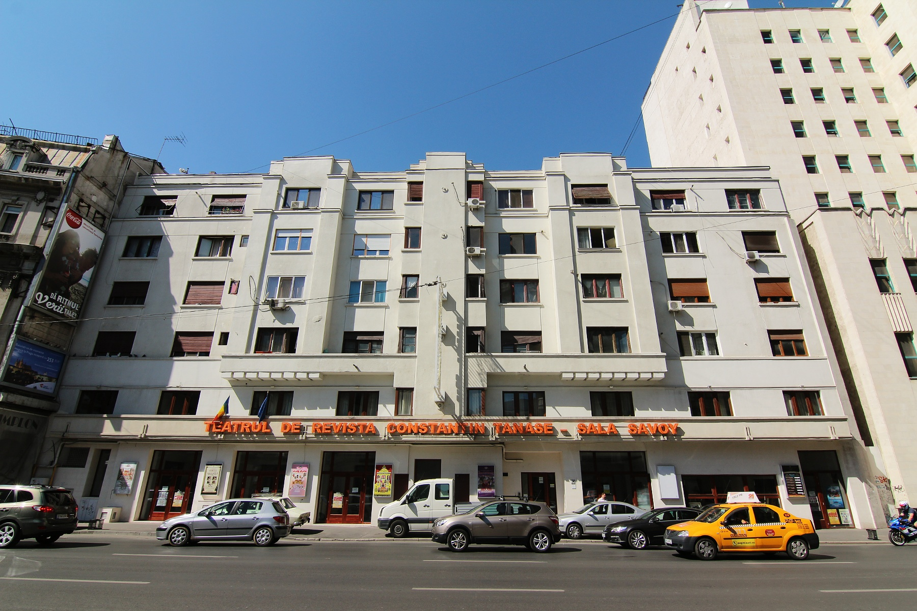 Imobil „Frascati""